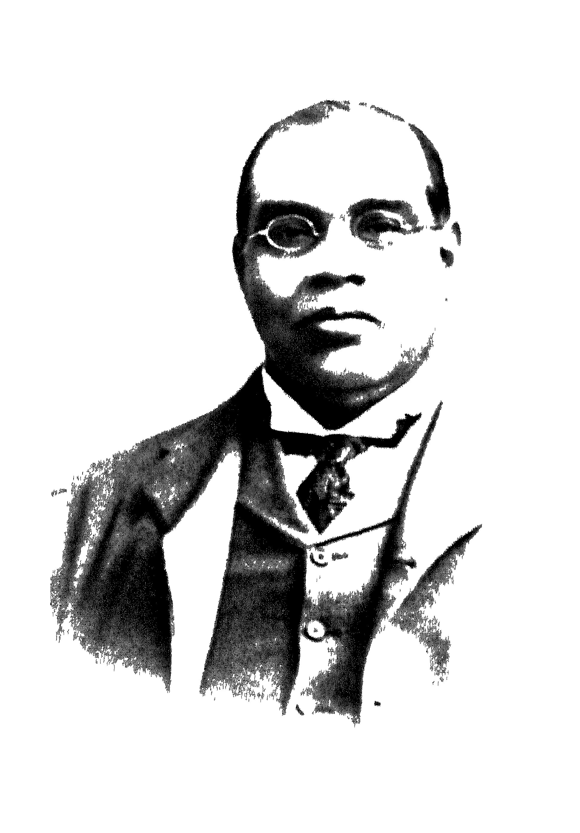 This picture, screened from an anonymous portrait, appeared as the frontispiece of J. N. Gupta's Life and Works of Romesh Chunder Dutt, published in New York and London in 1911. It was reproduced in the digital version of Gupta's biography of Dutt, at J. N. Gupta, Life and Works of Romesh Chunder Dutt", (1911) Digital Library of India, Bangalore, barcode 2990100070832 On line.